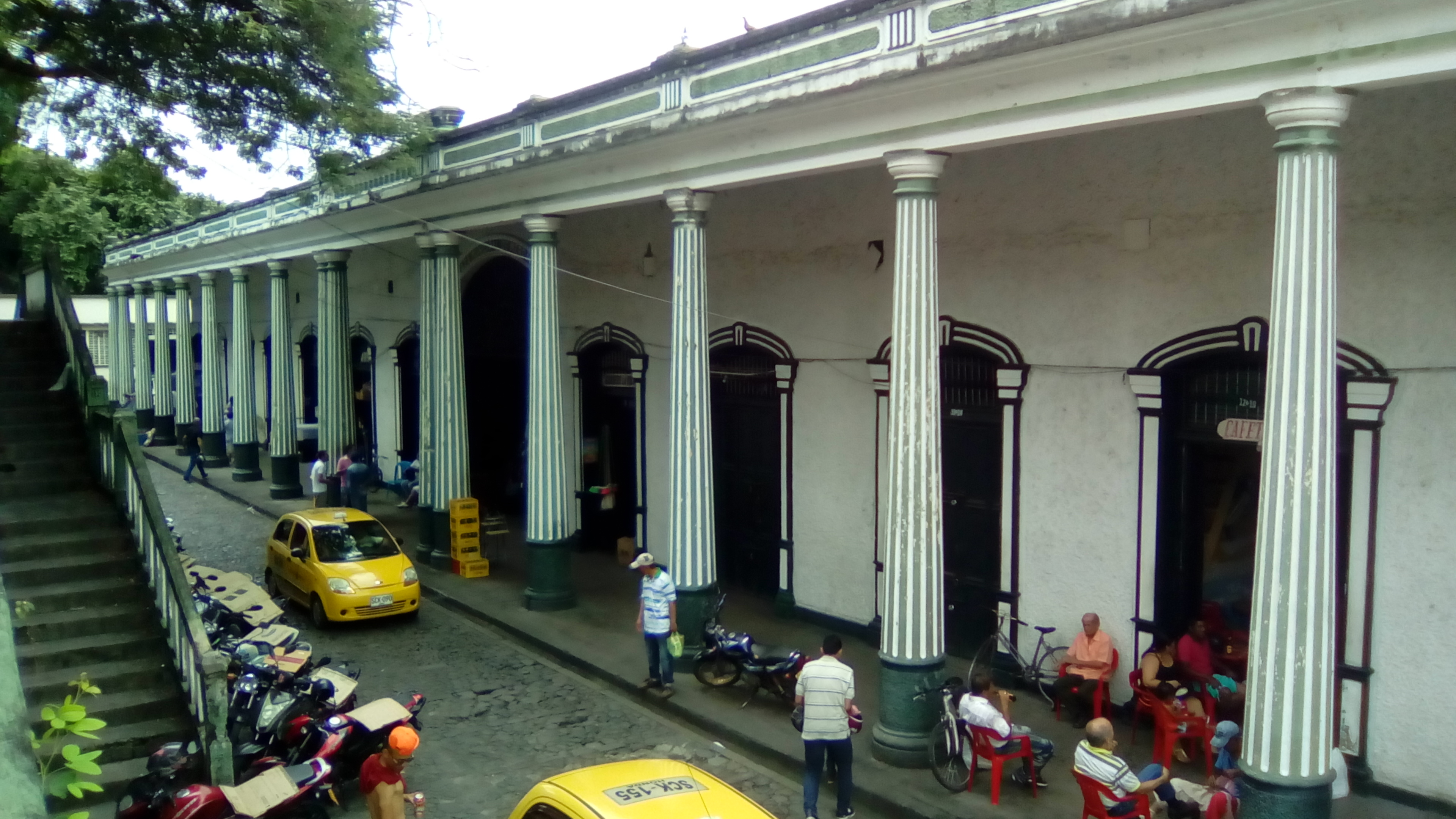 Plaza de mercado, pueblo de Honda, Tolima, Colombia